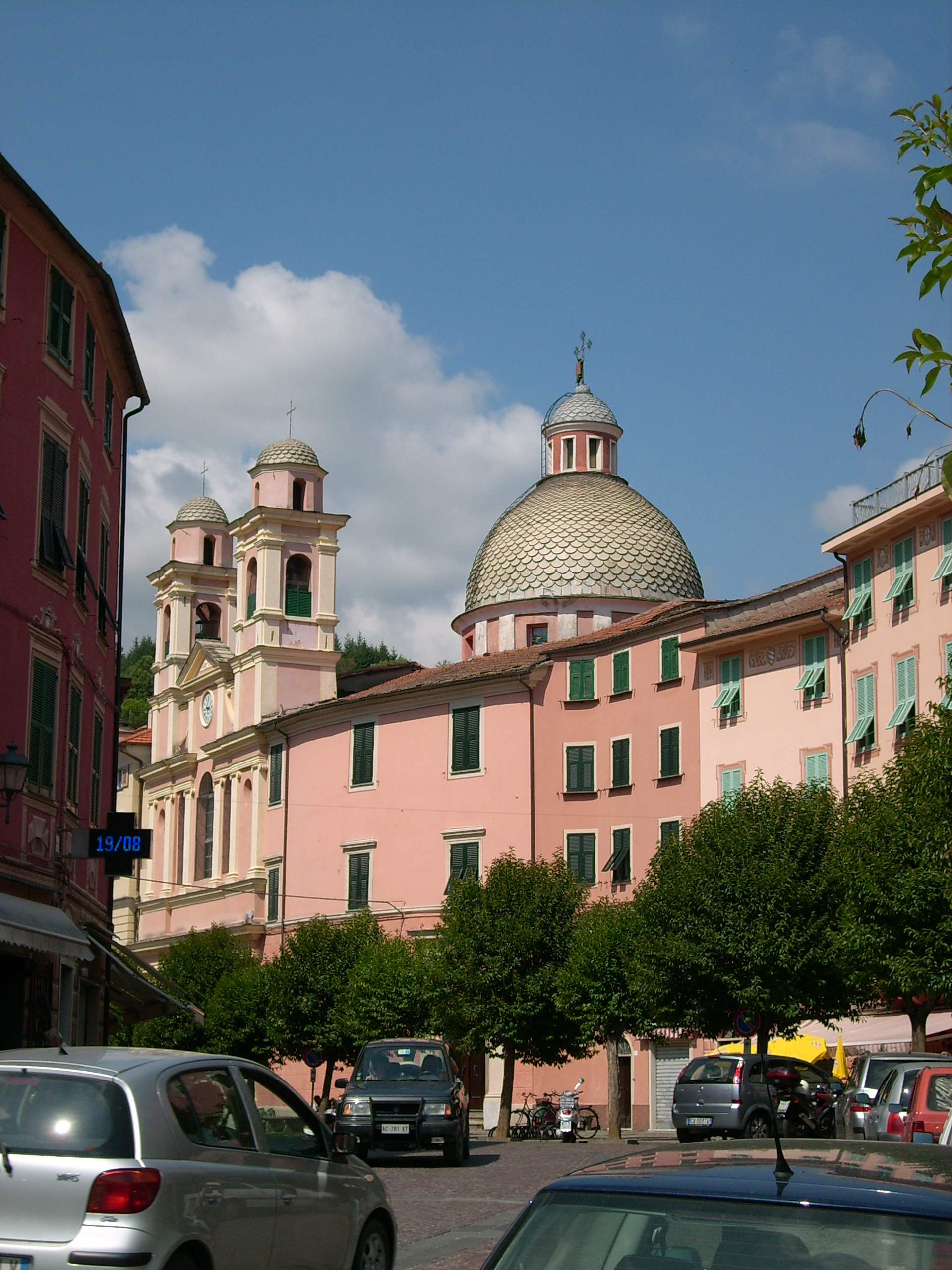 Chiesa di Varese Ligure, Liguria, Italia